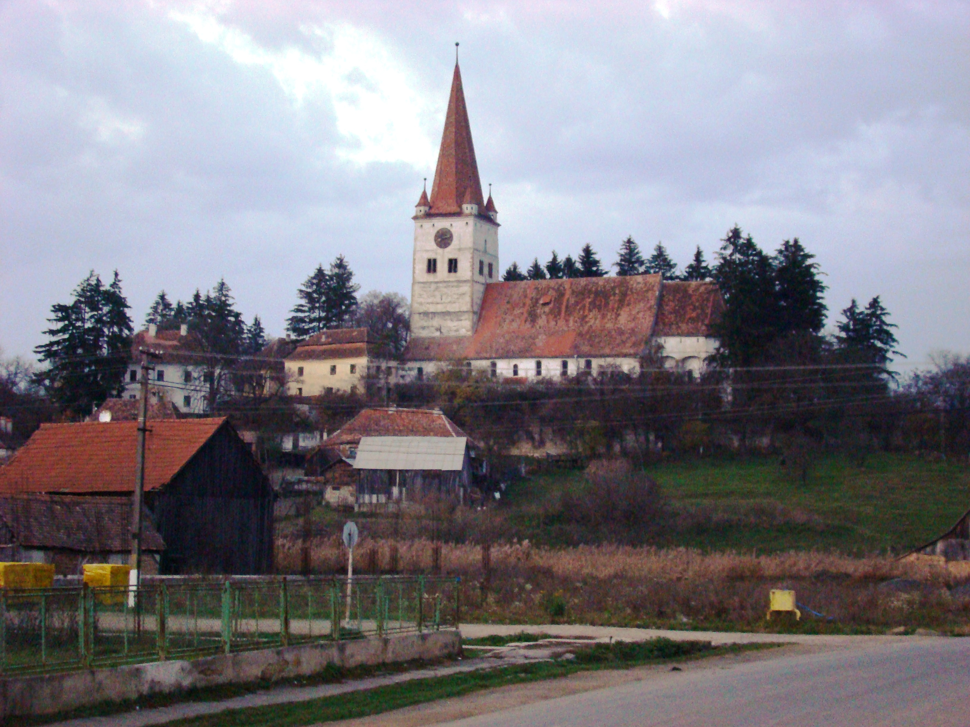 Biserica fortificată din Cincu, județul Brașov